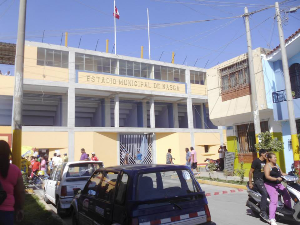 La entrada principal del estadio municipal de Nasca.